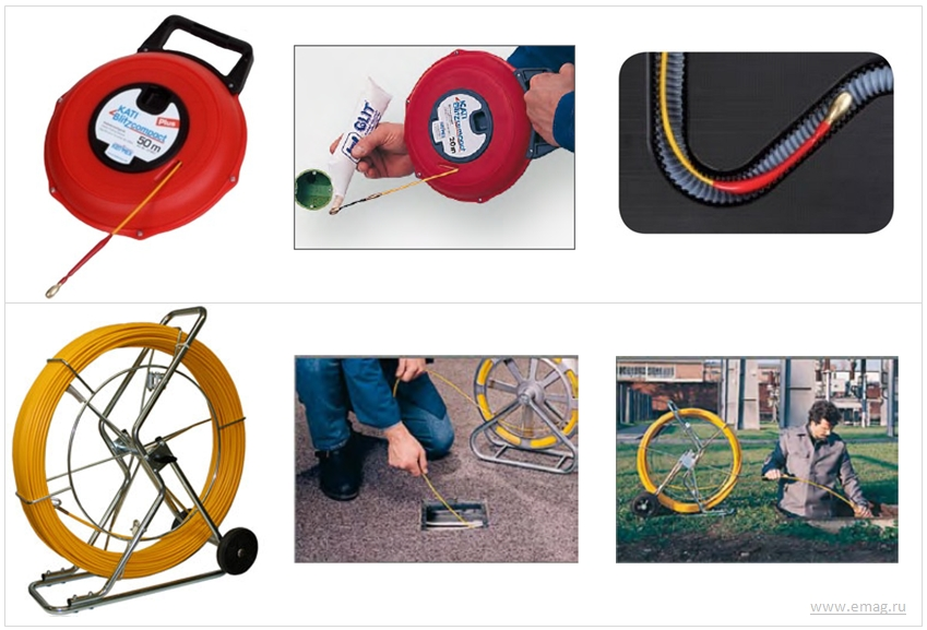 УЗК Katimex